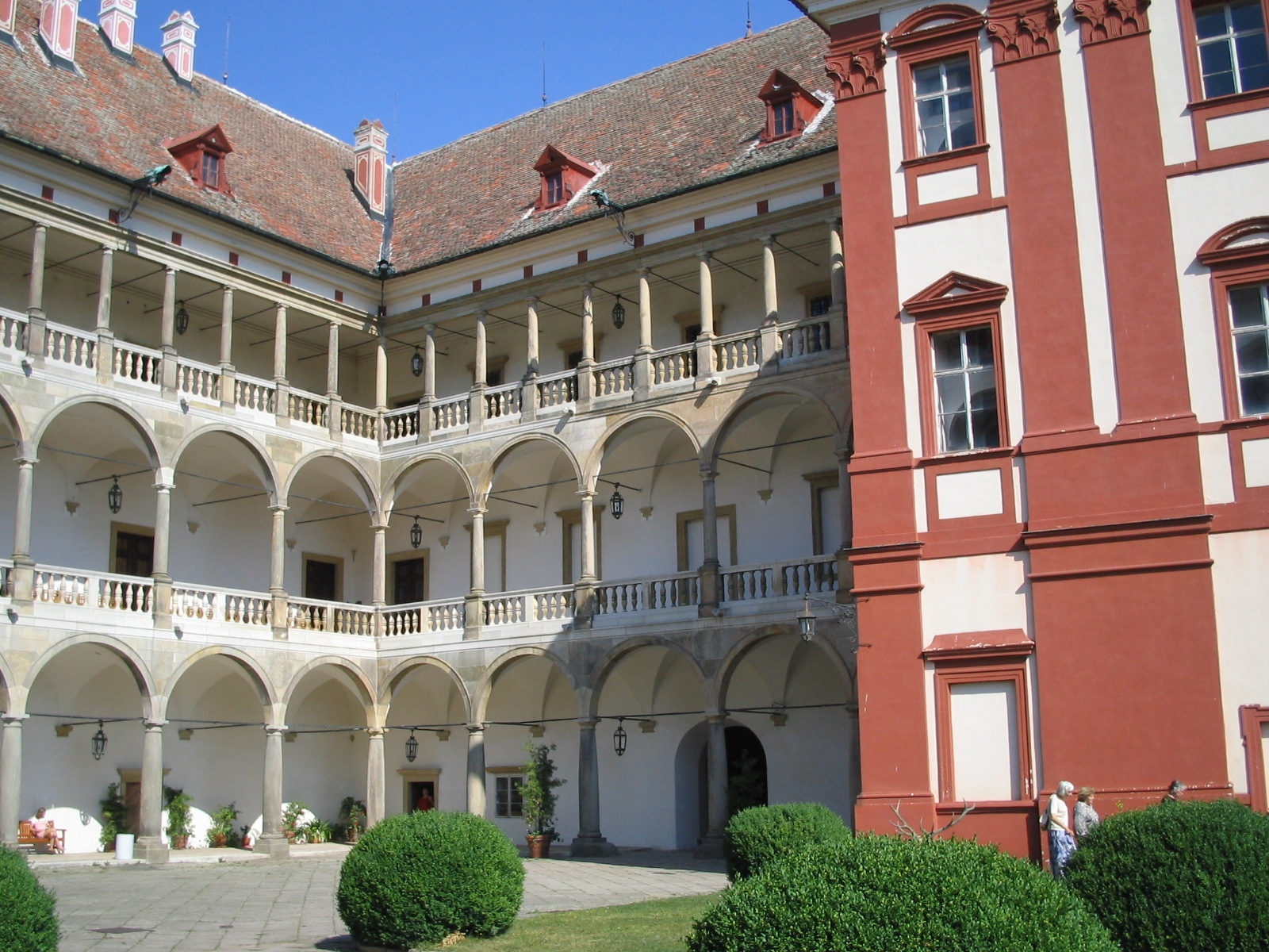 Castle Opocno, Czech Republic. Nádvoří opočenského zámku.